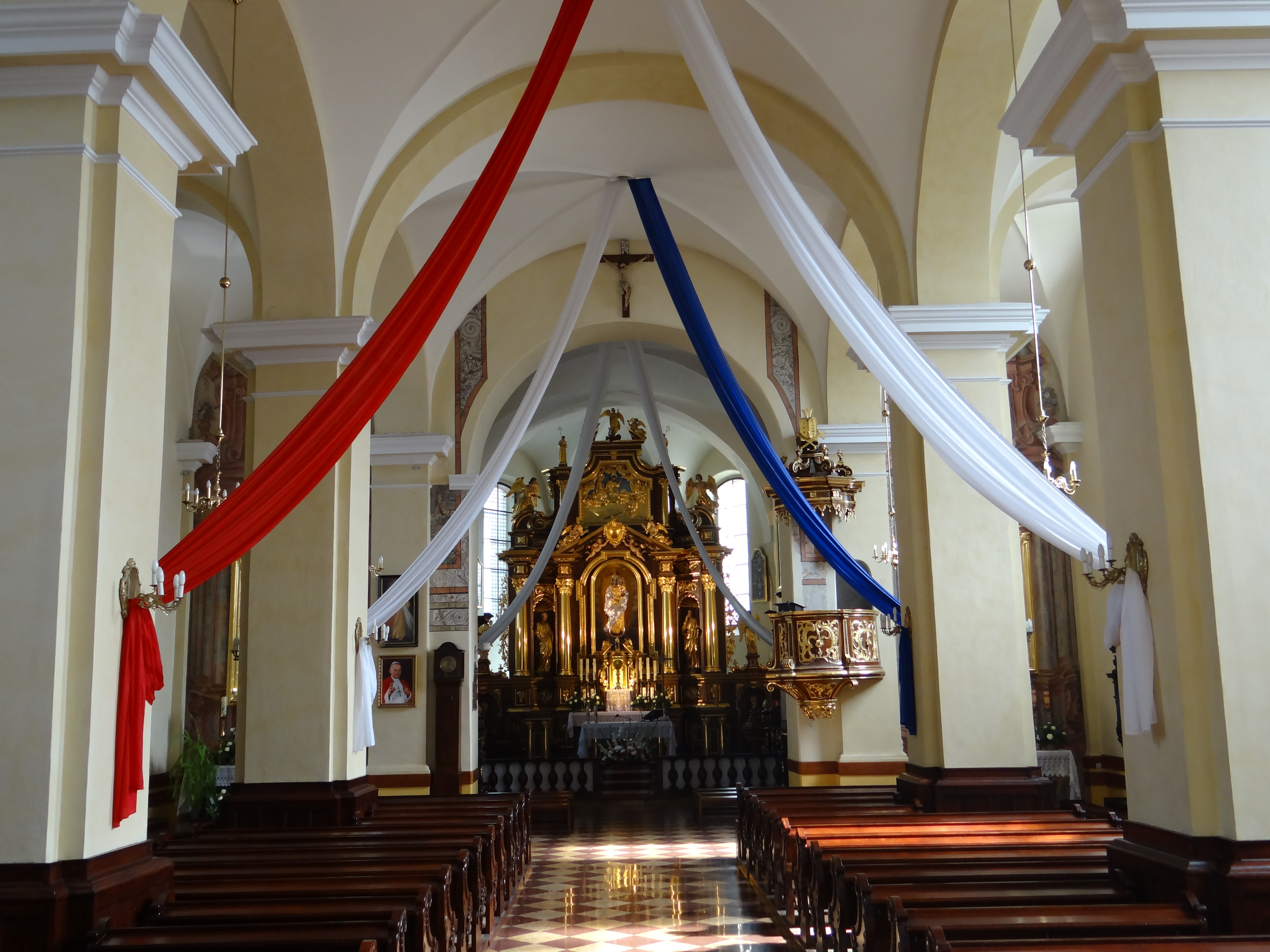 Przeworsk, kościół p.w. św. Barbary, 1461-1465, 1620-1647, 1757, 1902